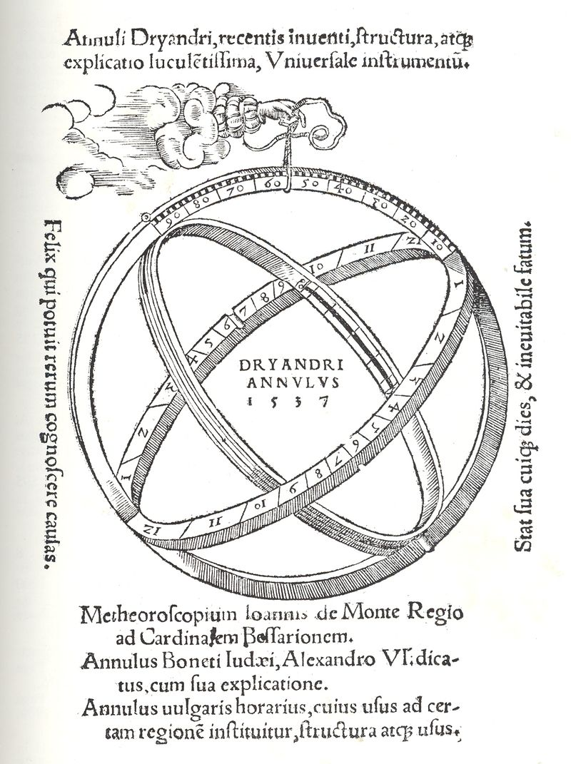 Astronomical ring dial